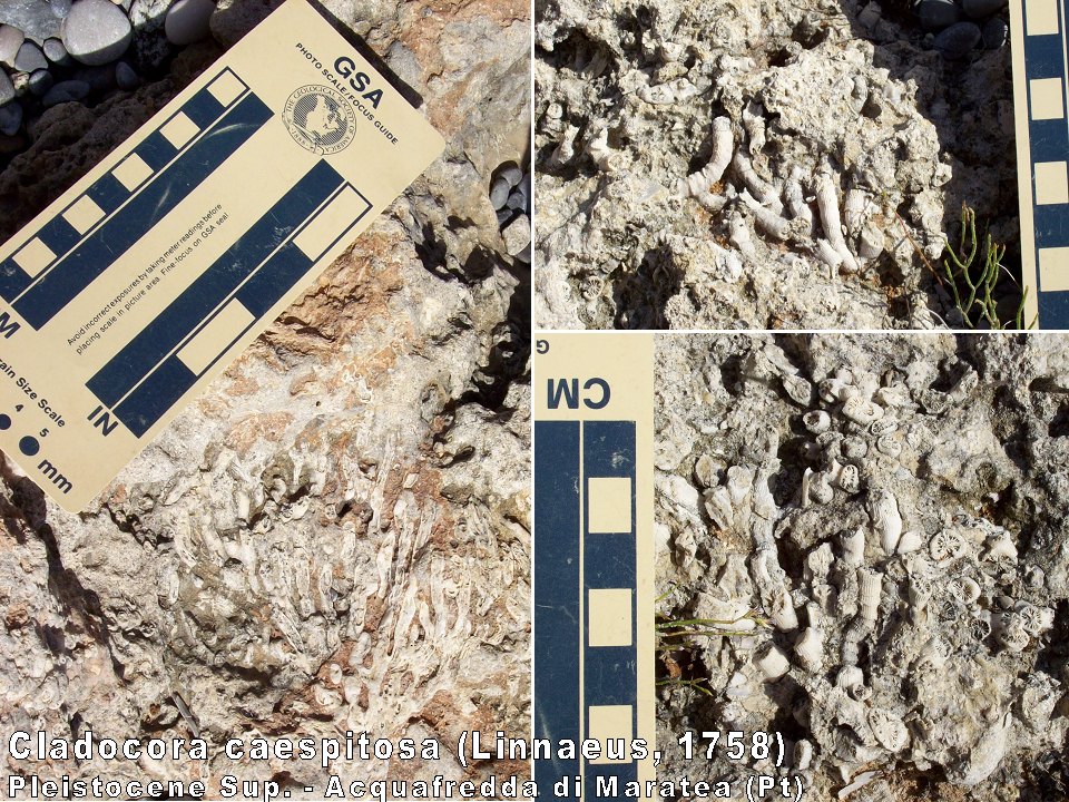 colonia fossile di Cladocora caespitosa (Linnaeus, 1758).Acquafredda di Maratea (Potenza, Italia). Pleistocene Superiore. Datazione da Barbera C., Billia E., Candeloro M., Petronio C., Virgili A. & Zarlenga F., (1995). Short report on Pleistocene fauna from Grotta Lina (Marina di Maratea,Southern Italy): palaeoecological and geochronological implications.